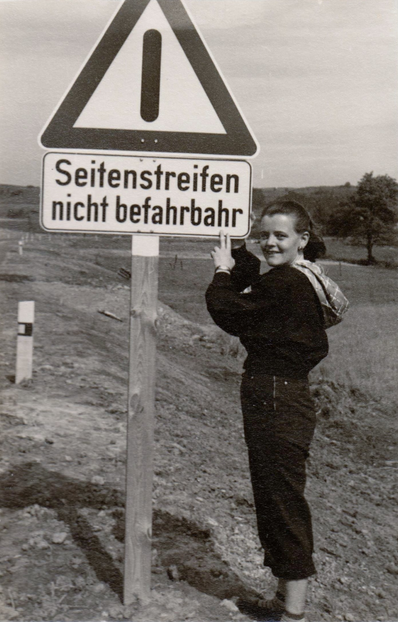 Bild 1 der StVO („Allgemeine Gefahrstelle“) mit einer Zusatztafel in Nordhessen. Das Bild 1 wurde in dieser Form erst seit StVO-Novelle 1956 aufgestellt, dem Jahr in dem auch das Foto entstand. Der Satzfehler soll wohl auf die eventuell notwendig werdende Bahre hinweisen. Neben dem Schild steht Juliane Meyer, meine spätere Frau.